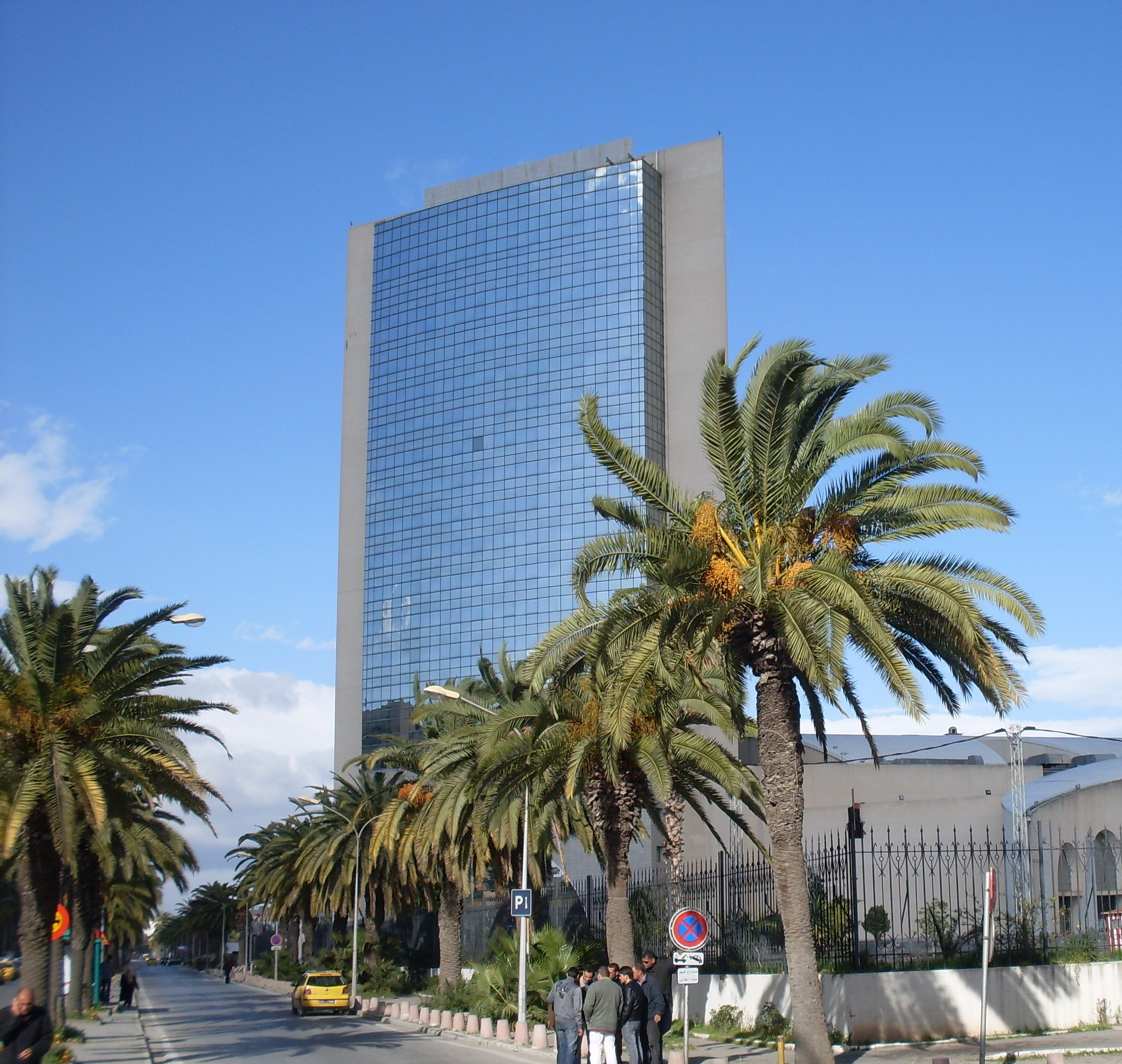 Siège du RCD lors de la révolution des jasmins